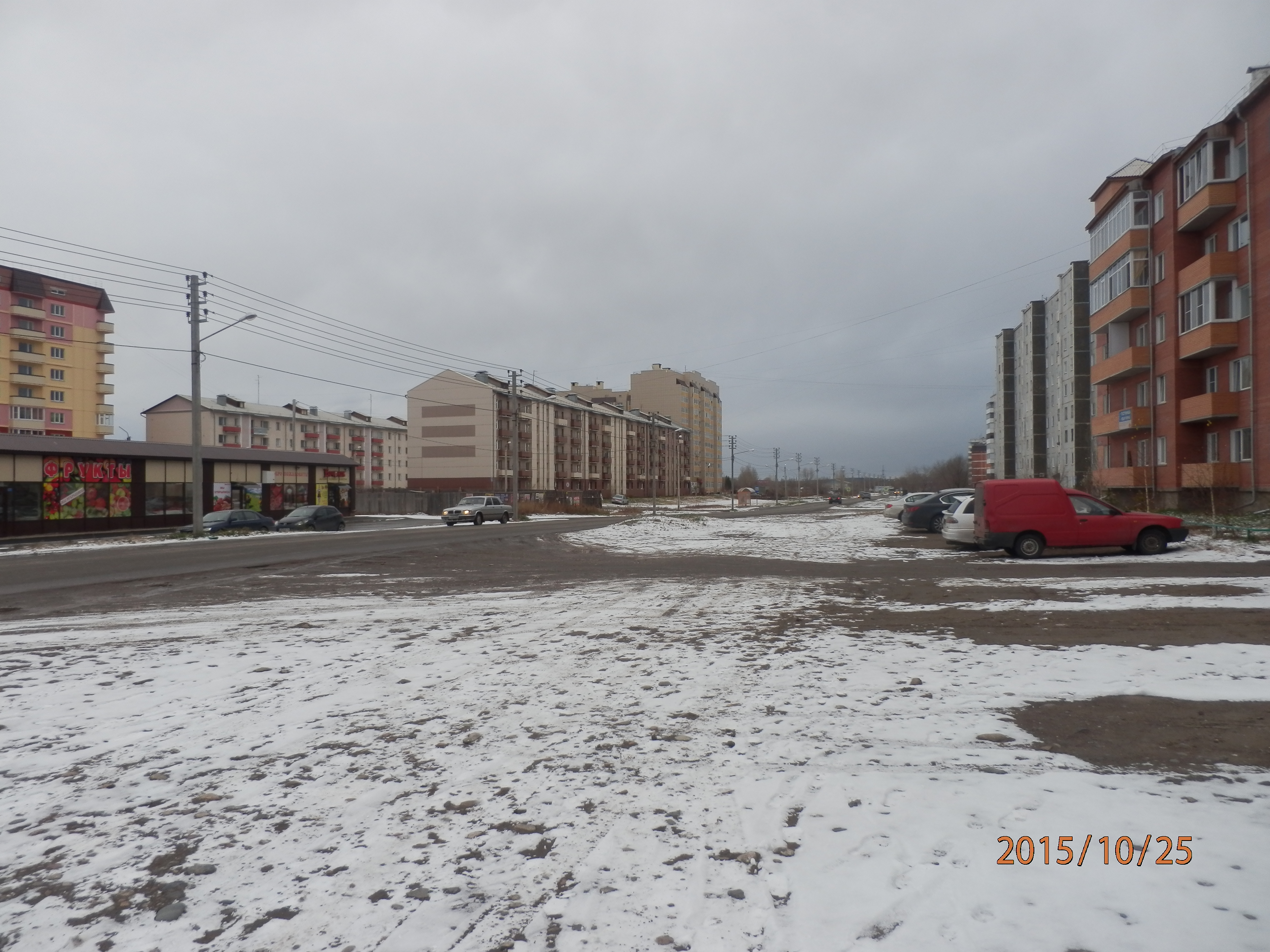 Первый снег. ул. Трегубенко